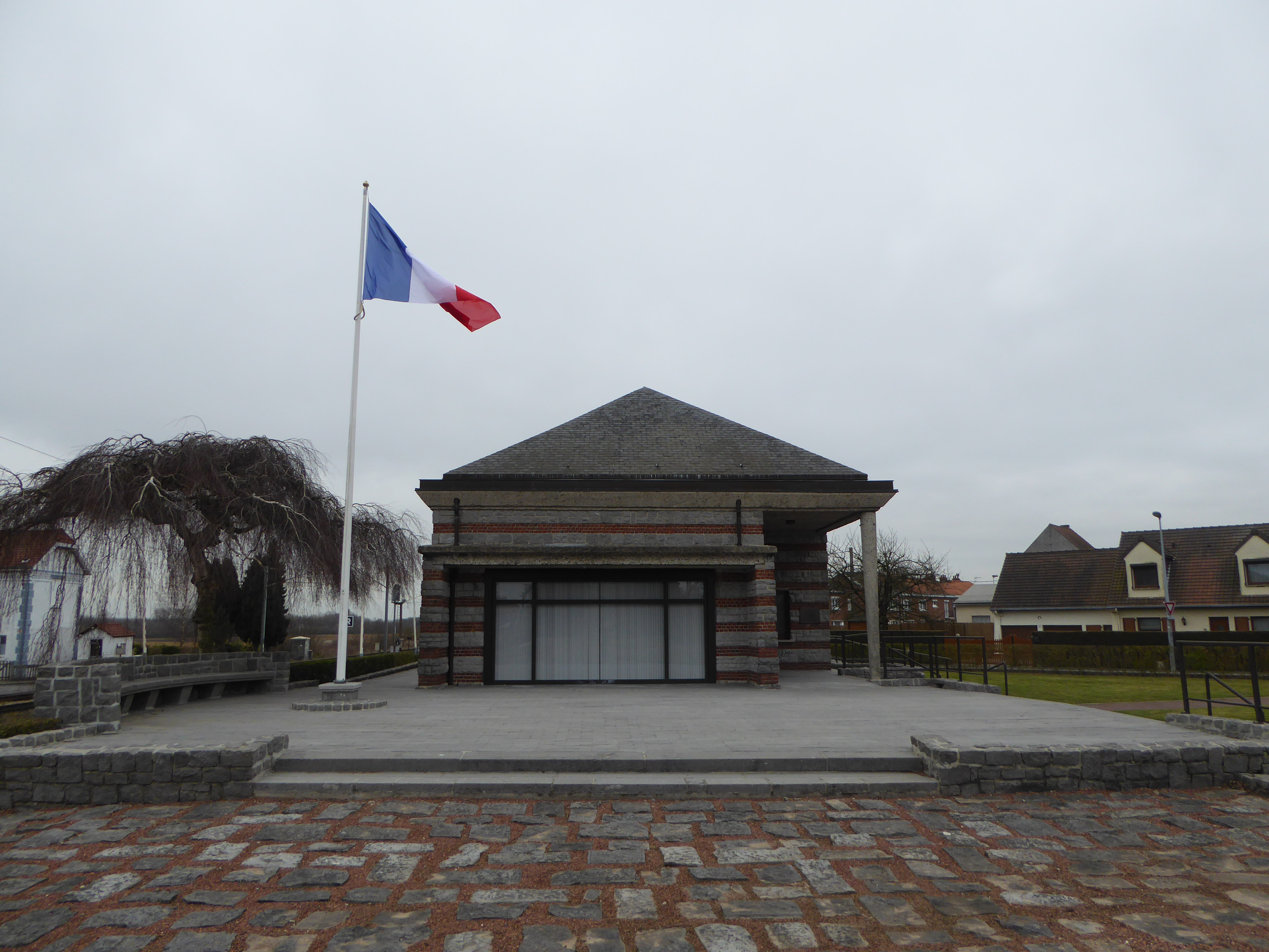 Mémorial Ascq 1944, Villeneuve-d'Ascq Nord.- Hauts-de-France.